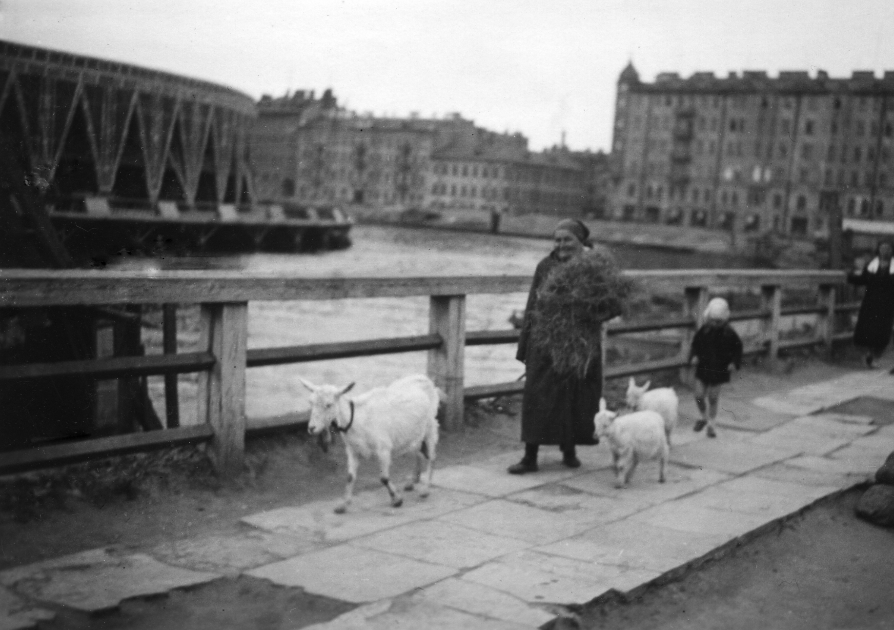 Format: Fotopositiv Arkivreferanse: Tor.H46.B08.F22695 Merknad: Fra en reise til Sovjetunionen foretatt av Eirik Sundvor omkring 1925 - 1935.